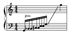 Mögliche Notation eines Glissandos über einen Akkord